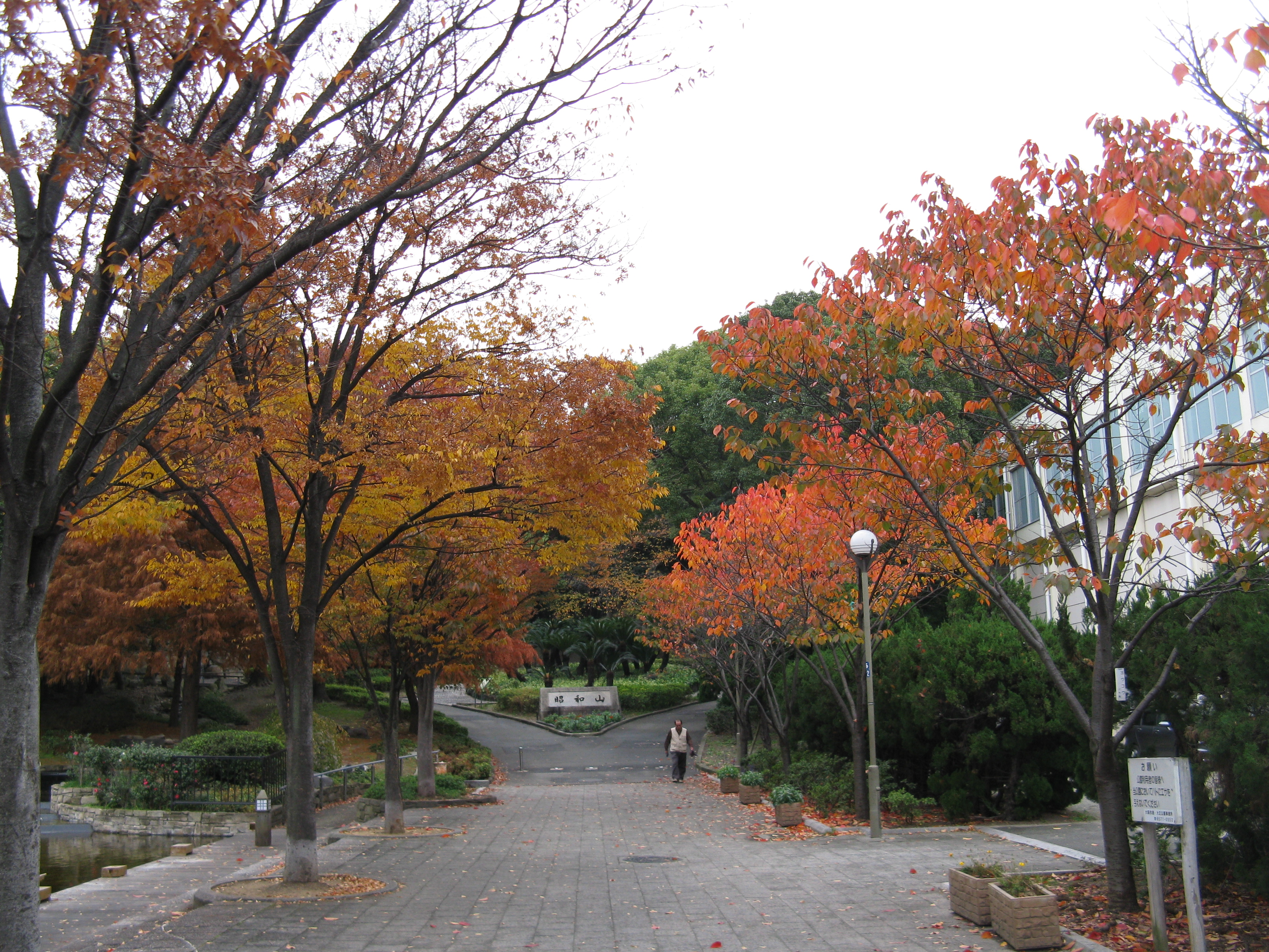 昭和山